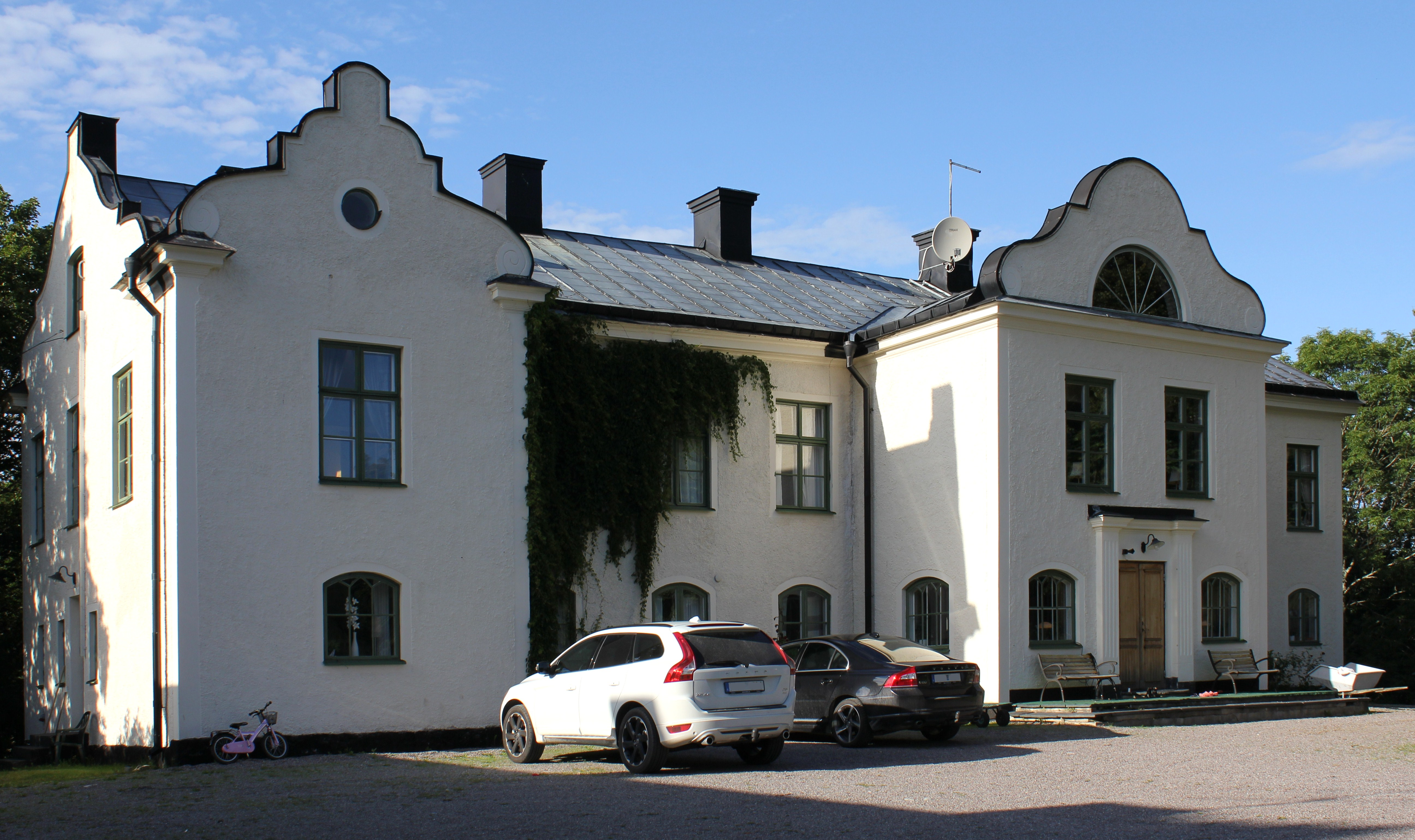 Nolinge gård i Grödinge socken, Botkyrka. Mangårdsbyggnaden.